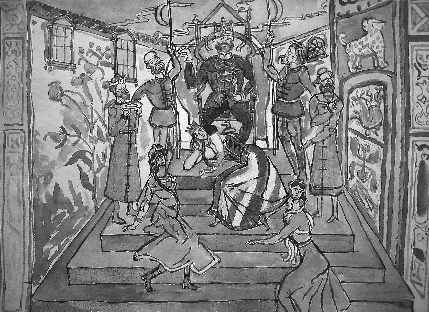 Эскиз трона Царя Максимилиана. 1910